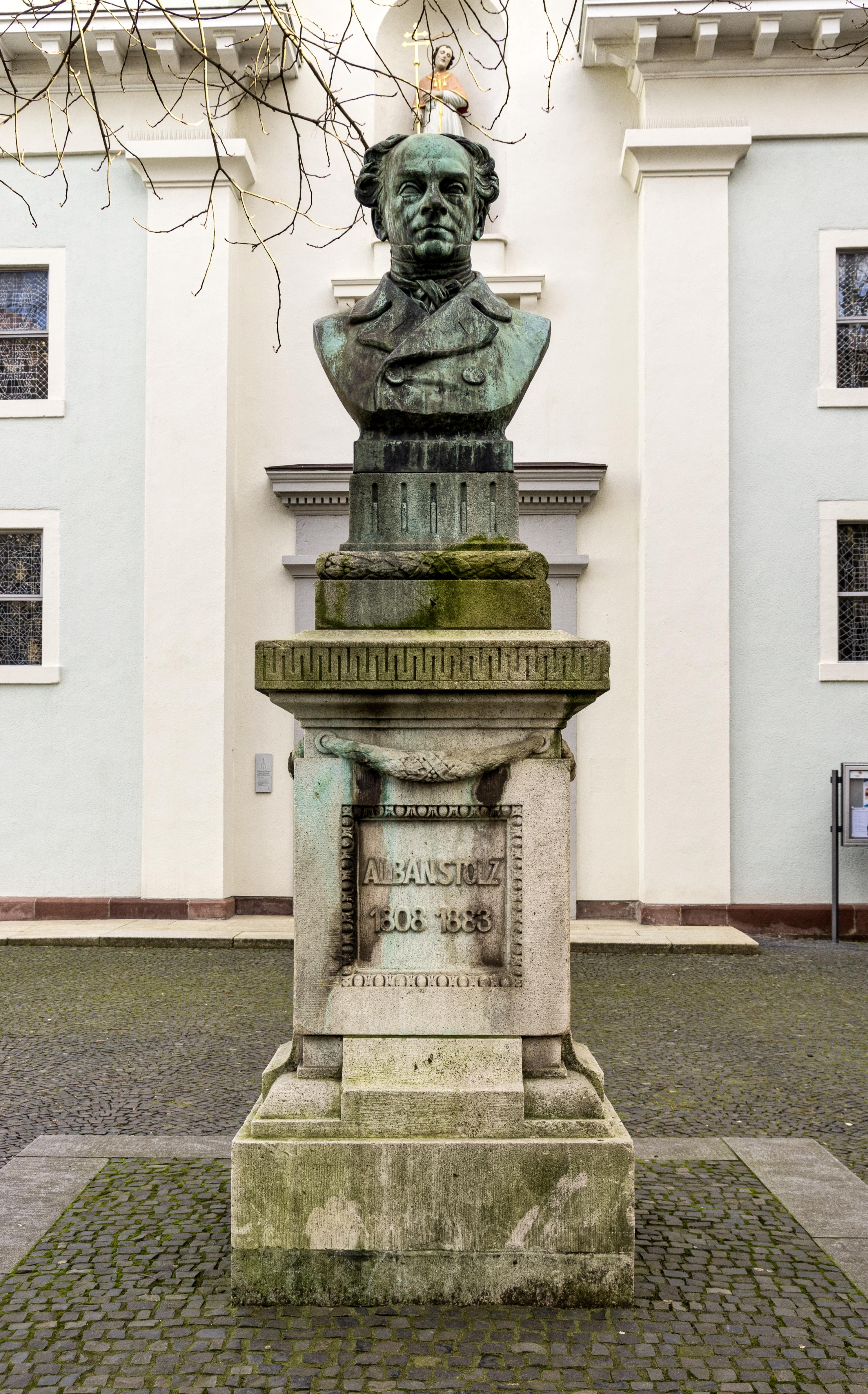 Bilder aus Freiburg Denkmal für Alban Stolz